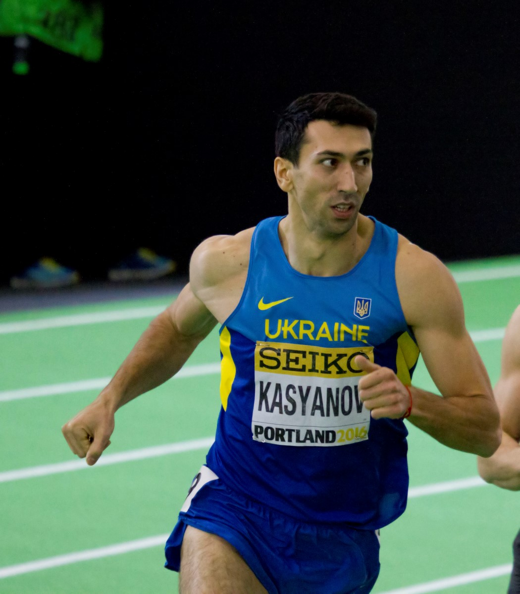 543 800m meerkamp